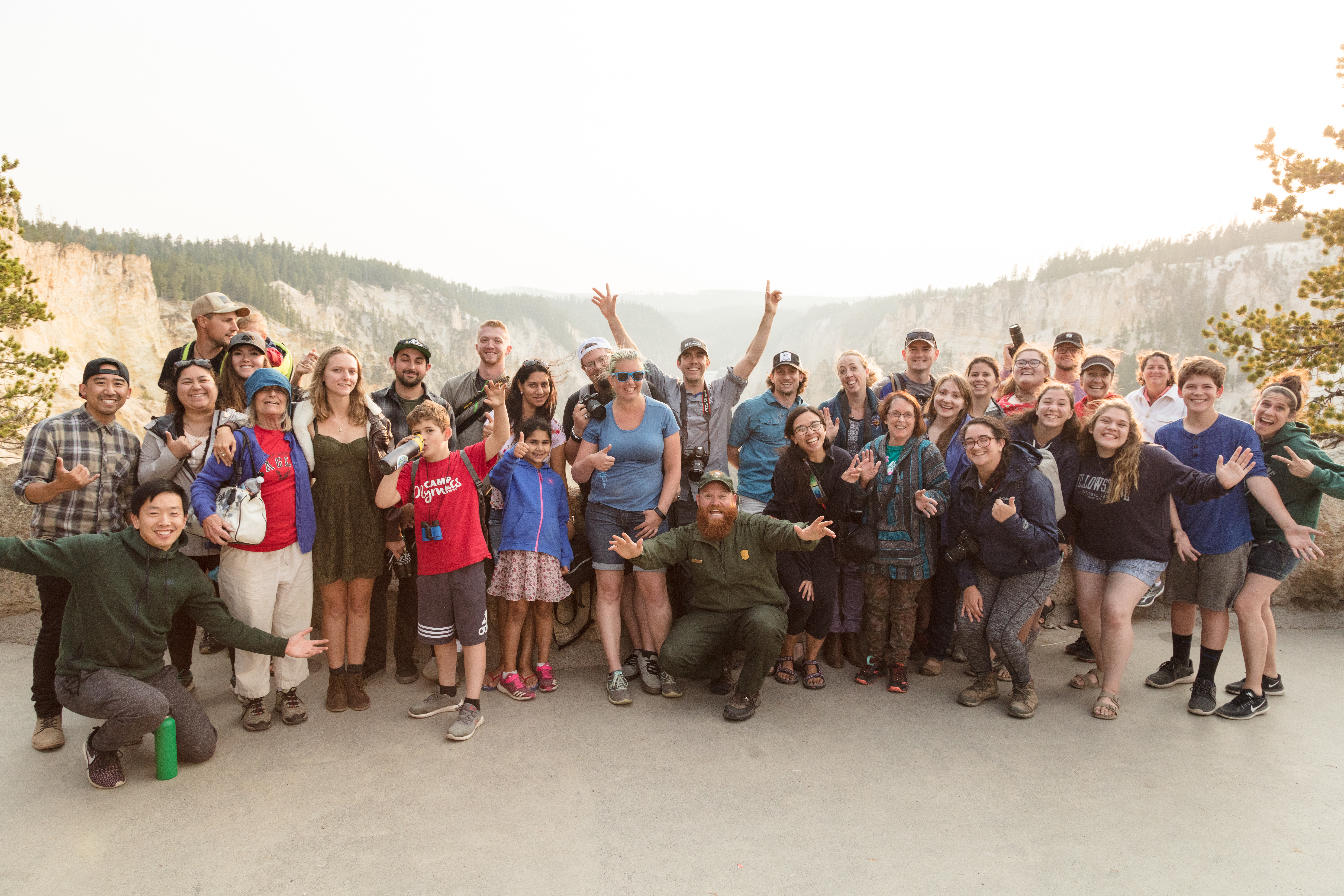 NPS / Jacob W. Frank